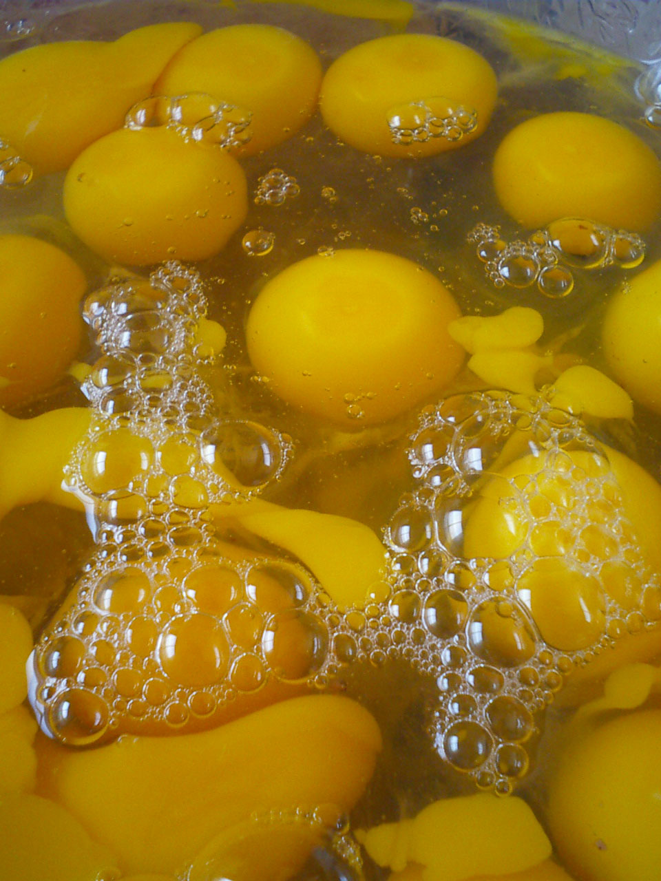 Egg, before stir.